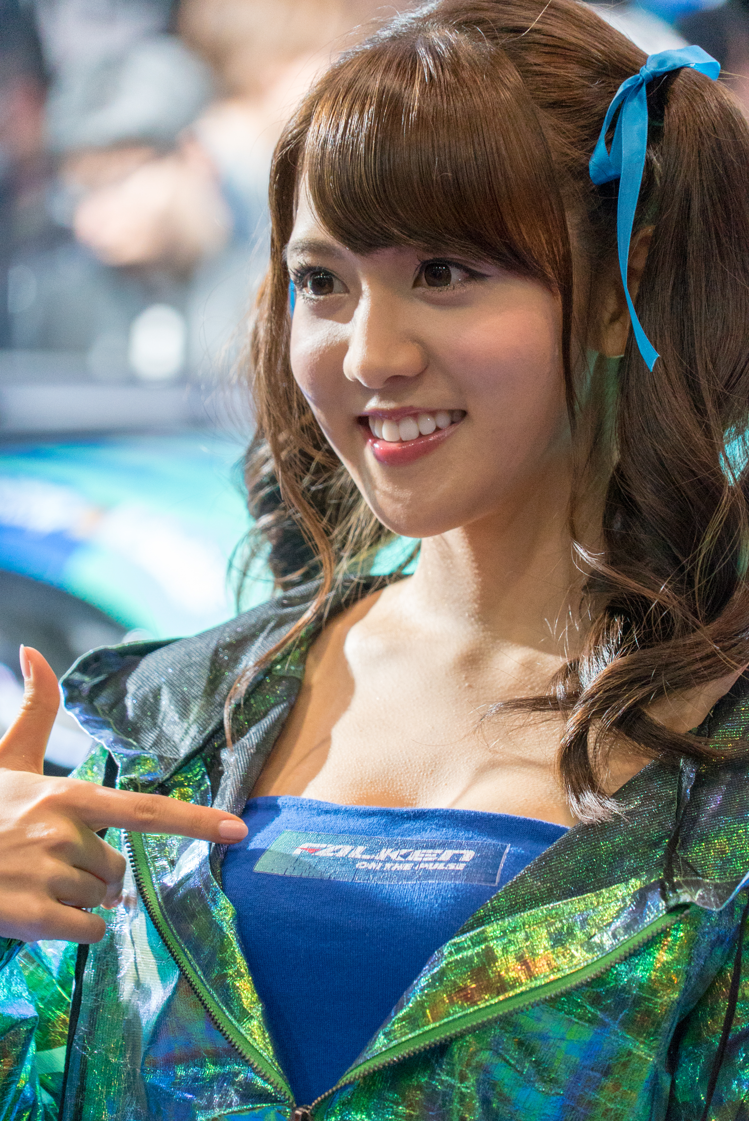 TOKYO AUTO SALON 2018-14.jpg